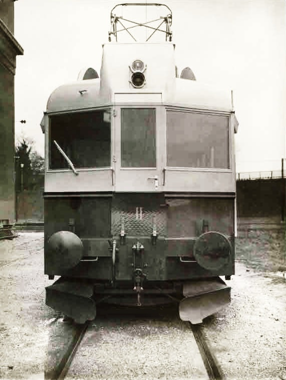 Stirnseite des BCFZe 4/6 736 der Bern-Neuenburg-Bahn (BN)